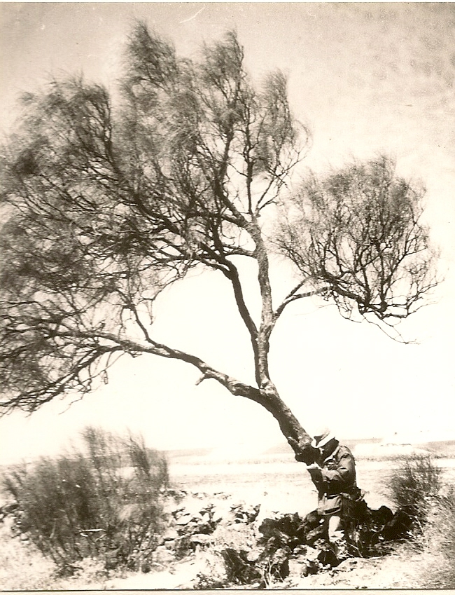 Un exemplaire arborescent de Retama monosperma préservé sur le sommet de la koudiat El-Gaada (sert de point géodésique). Un arbre certainement maraboutique, préservé.